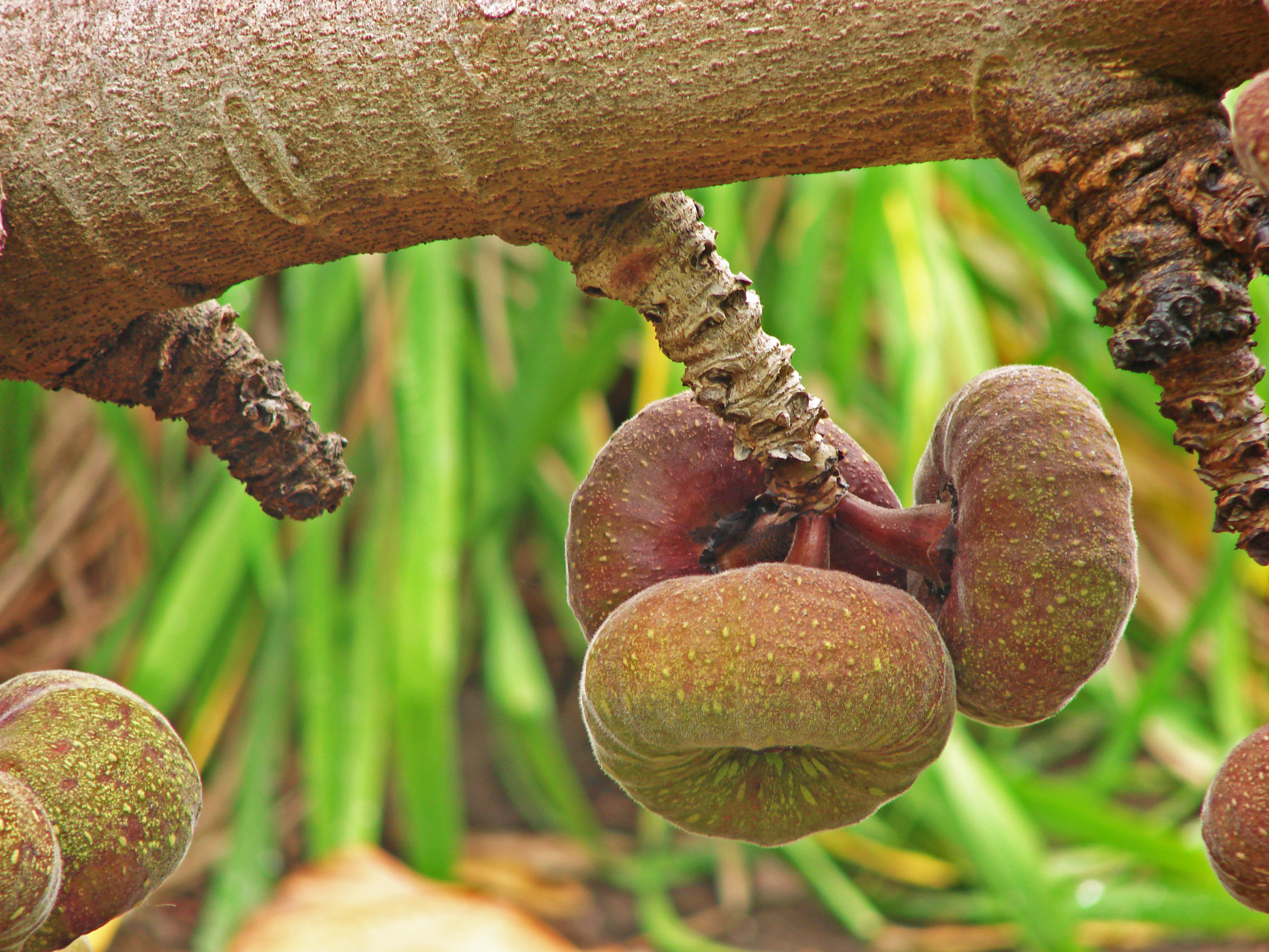 Himalaya-Feige, Ficus auriculata (Lour.), Moraceae , Früchte